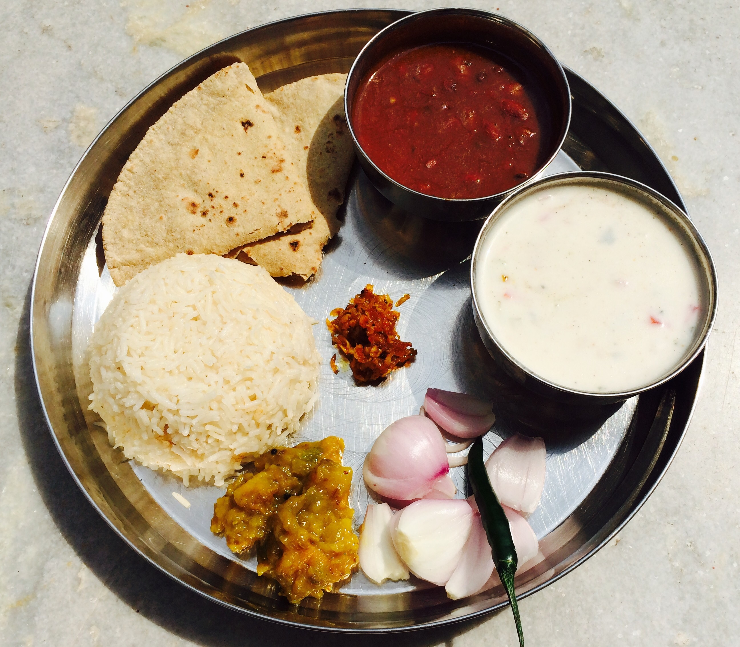 This thali has rajma, chawal , curd , roti , pickle , onions and chilli.